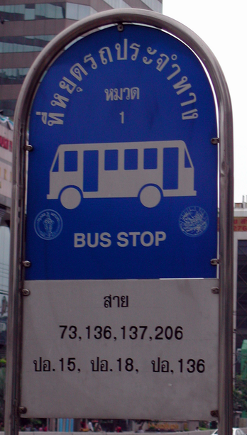 Waerth 30 aug 2004 04:31 (CEST)